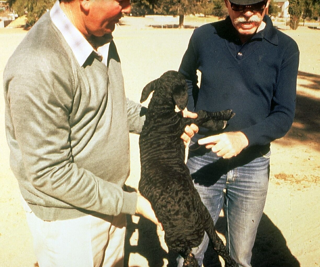 Ovis aries Linné, Karakul lamb (Persian lamb) in Namibia, Karkulzucht in Namibia - Begutachtung der Fellzeichnung Nr. 52, Region Uhlenhorst